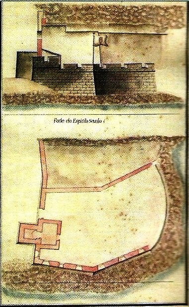 Forte do Espírito Santo, s/d, autor desconhecido, Arquivo Histórico Militar, Lisboa. in MARTINS, José Salgado, "Património Edificado da Ilha Terceira: o Passado e o Presente". Separata da "Atlântida", vol. LII, 2007. p. 50.